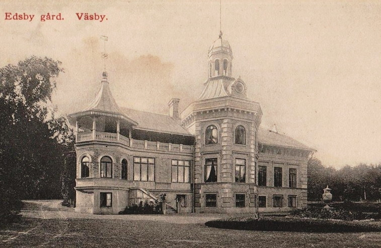 Edsby slott före ombyggnaden 1905